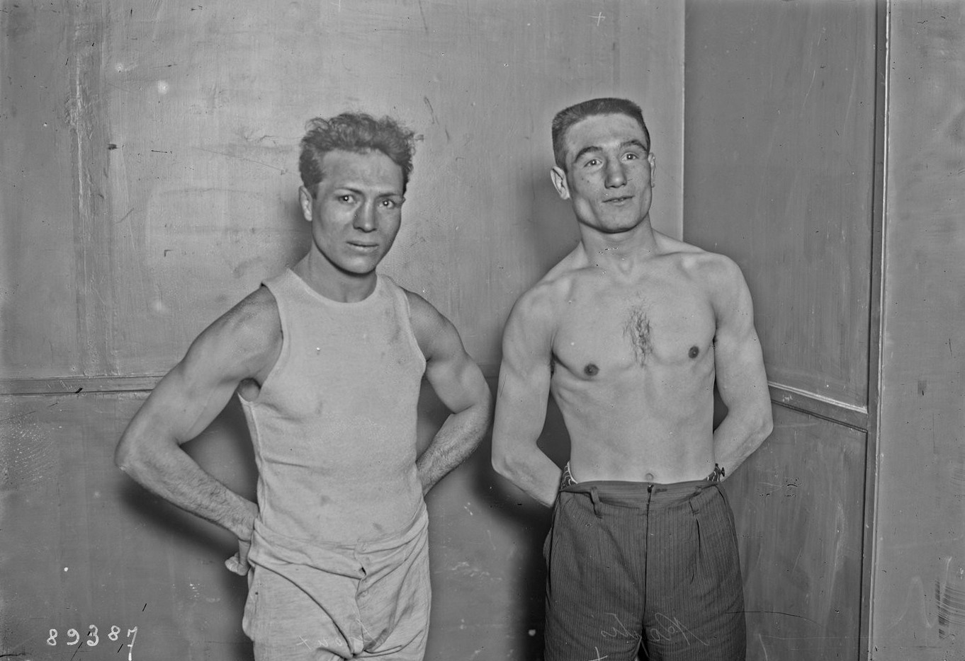 Photographie en noir et blanc de deux hommes sportifs, mains dans le dos.